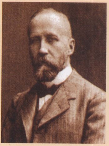 Теофіл Окуневський